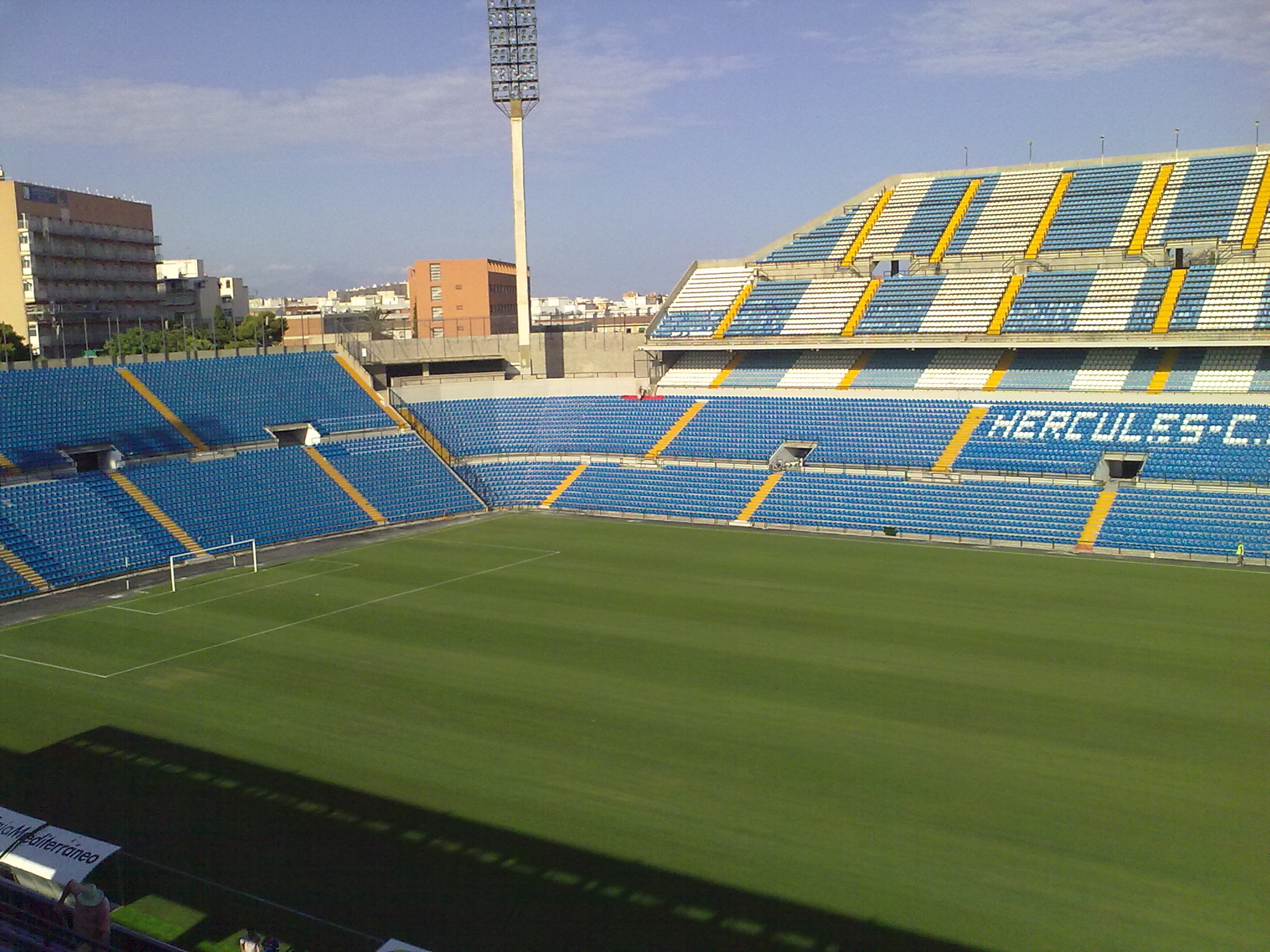 Estadio José Rico Pérez durante sus obras de mejora y pintado de butacas en el verano de 2010.